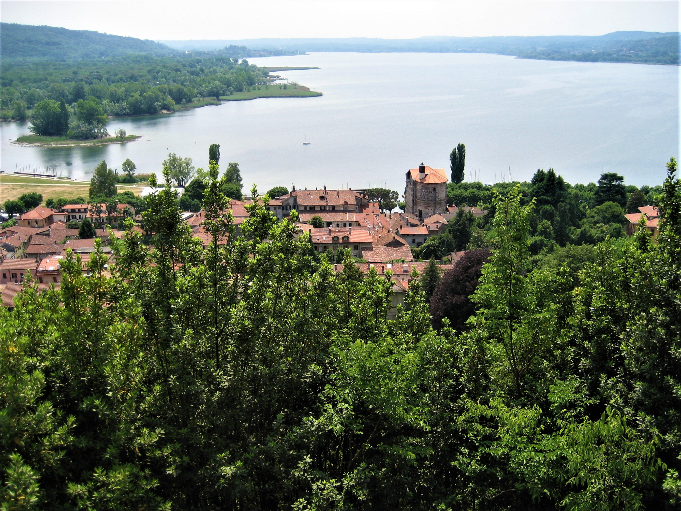 Blick vom Schloss nach Süden